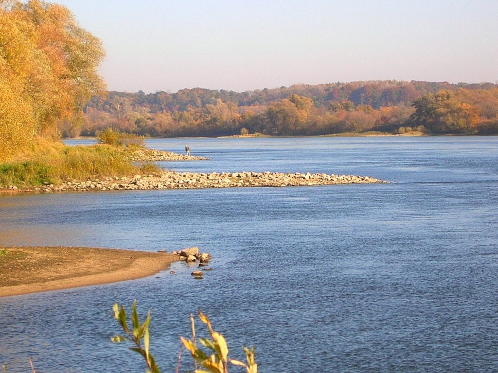 Wisła pod Fordonem w Bydgoszczy. Widok na ostrogi.